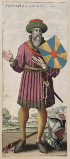 Graaf Arnulf I, De Grote - Afbeelding uit Flandria Illustrata - 1641